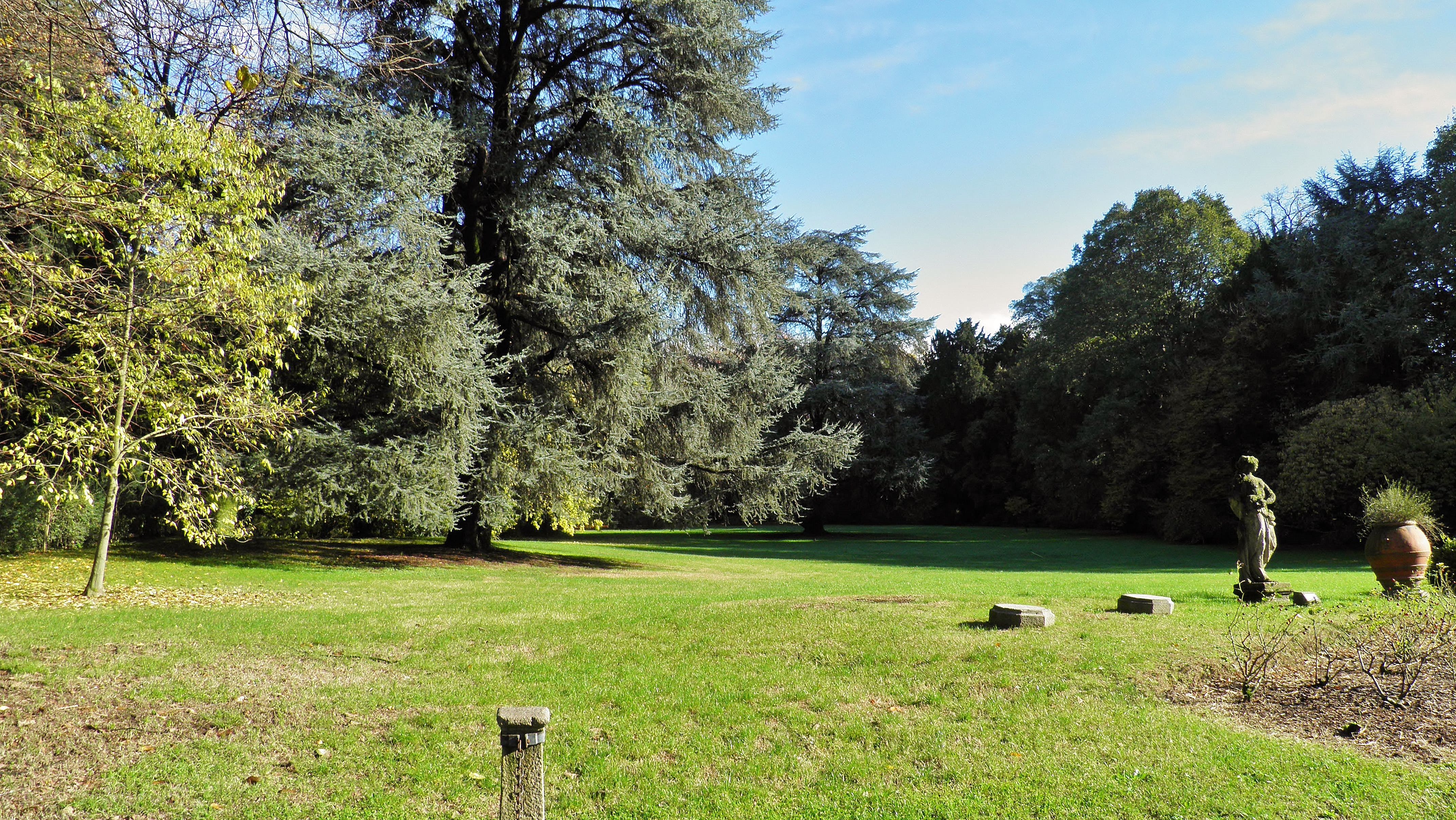 Giardino storico di Villa Ghirlanda Silva This is a photo of a monument which is part of cultural heritage of Italy.